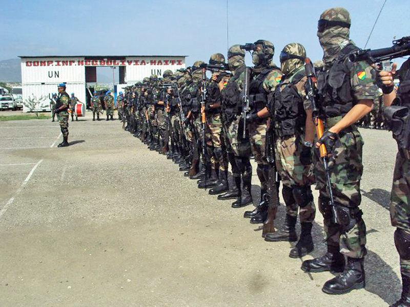 Compañia de Infanteria Mecanizada Bolivia - Haiti